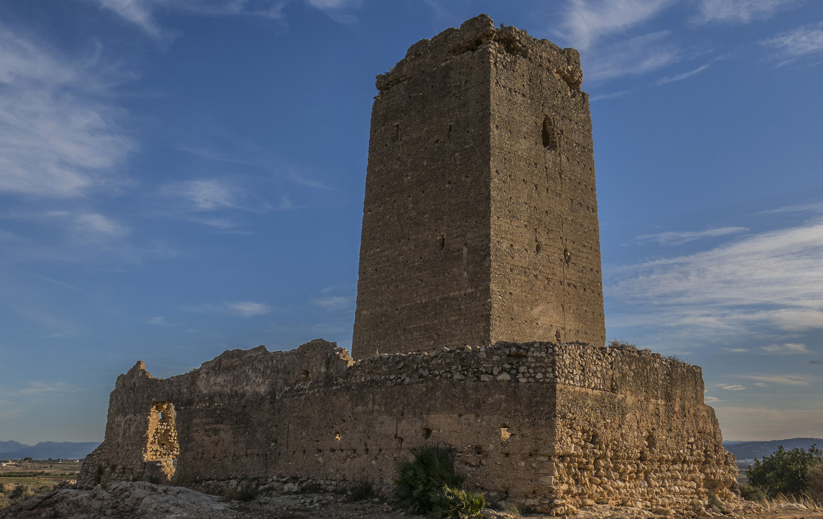 El castell d'Alèdua, al terme municipal de Llombai, a la Ribera Alta (País Valencià), és una plaça fortificada islàmica construïda a finals del segle XII, situada sobre un turó al marge esquerre del riu Magre a uns 4 quilòmetres de la població, en el despoblat d'Alèdua.